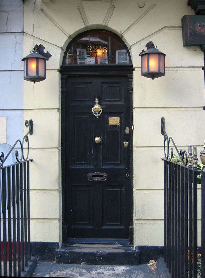 Baker street 221, London